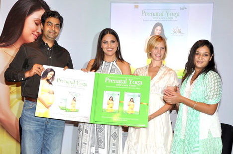 Lara Dutta unveils her 'Prenatal Yoga' DVD